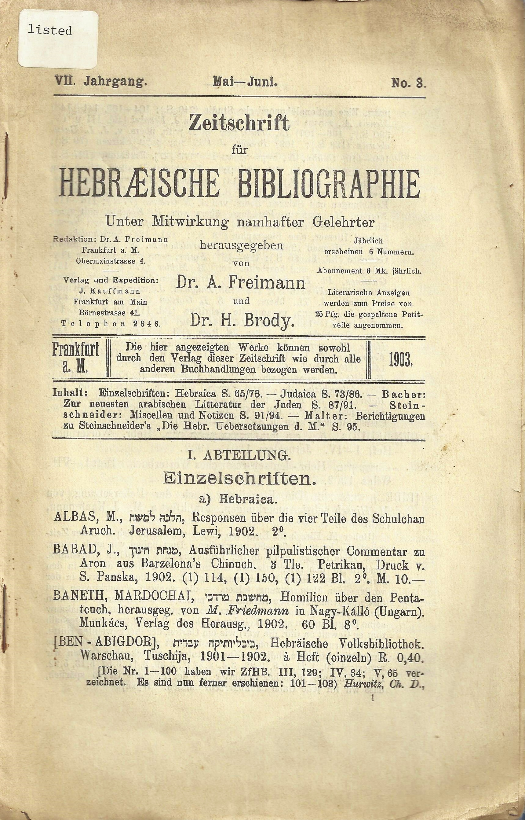 Zeitchrift für Hhebraische Bibliographie - Scientific journal published by Aron Freimann and Henrik Brody